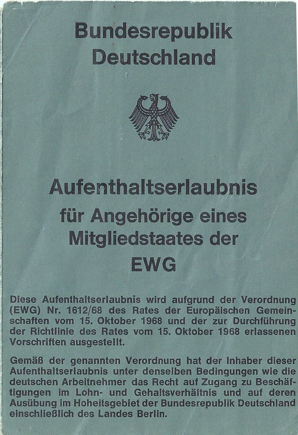 Aufenthaltserlaubnis für Angehörige eines Mitgliedsstaates der EWG - Bundesrepublik Deutschland 1980 - Seite 1